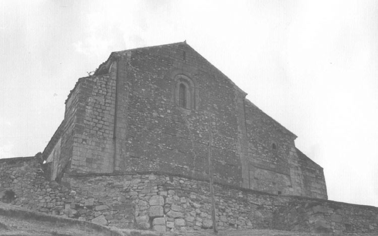 Iglesia - Caballar (Segovia) - Fotografía B/N